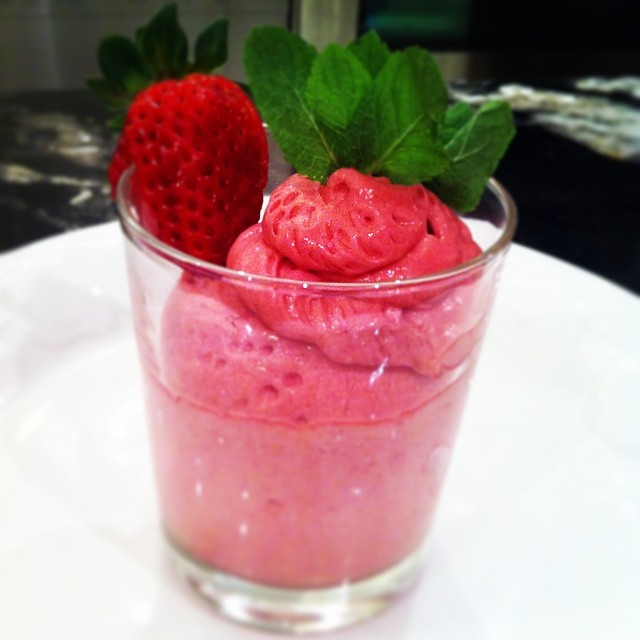 Espuma de framboises réalisée par Miro Lagueux